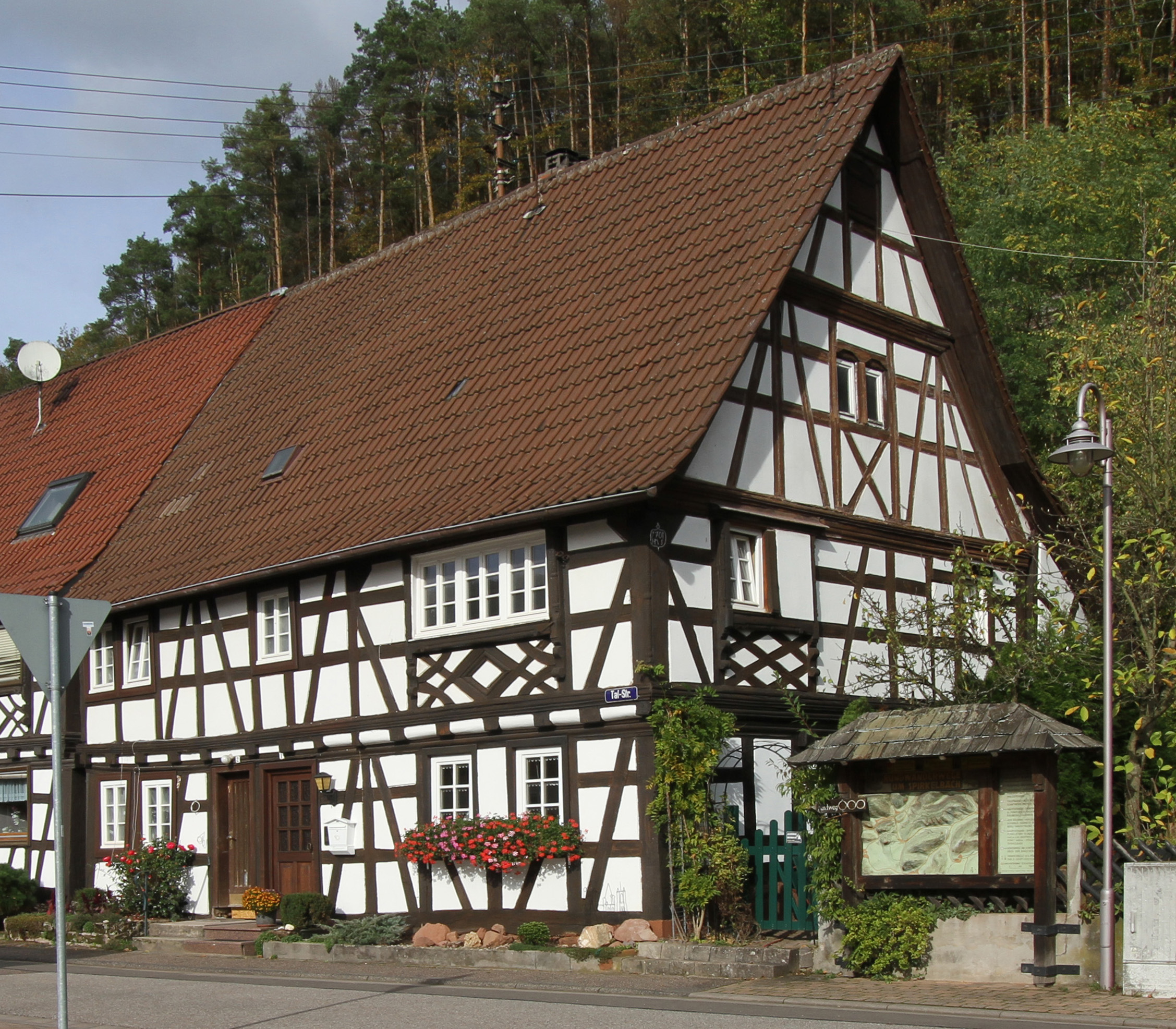 Spirkelbach